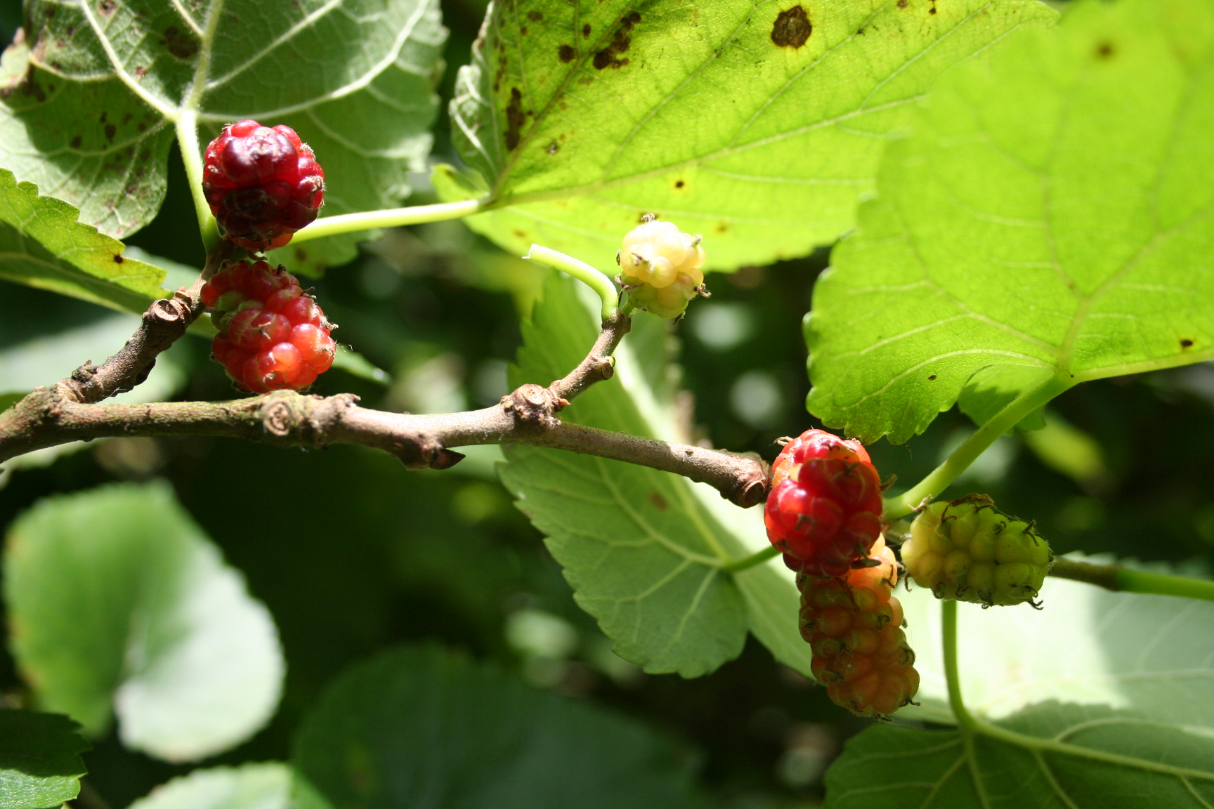 Fruits et feuilles du murier noir (Morus nigra) - Position de l'arbre: Morlanwelz-Mariemont - Domaine de Mariemont.